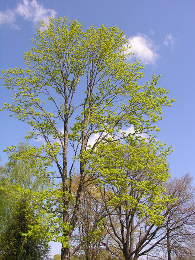 Žydintis paprastasis klevas (Acer platanoides) Šeima. Kleviniai (Aceraceae) Fotografavo: Algirdas, 2006 m. gegužės 10 d., Lietuva